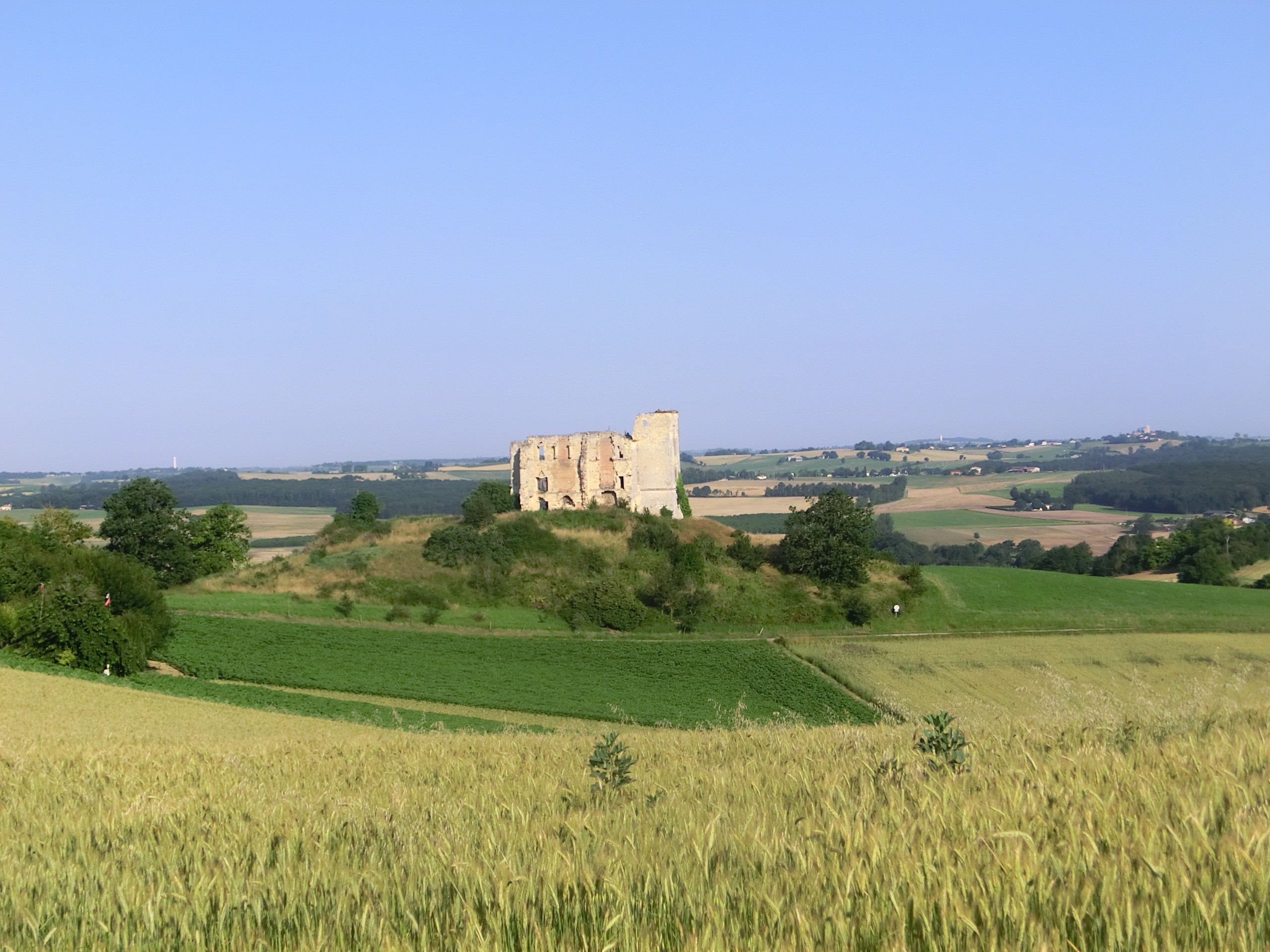 ruines du château de Gachepouy, à Castet-Arrouy (Gers, Occitanie, France)